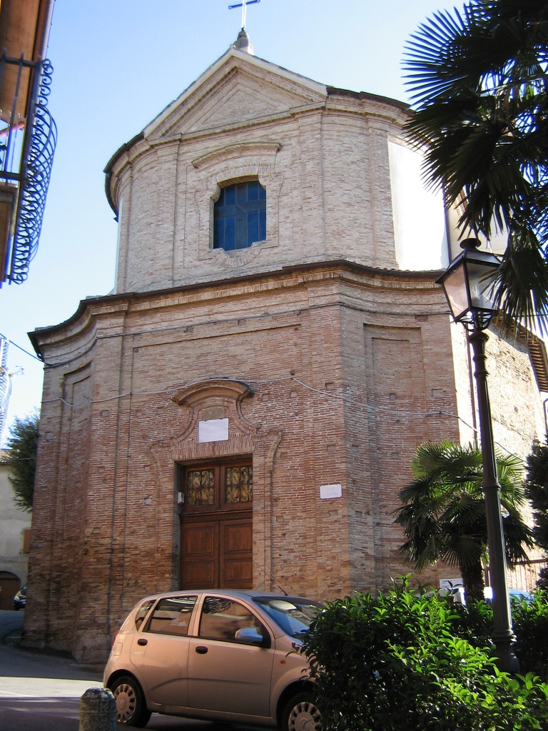 Chiesa del seminario vescovile, Bertinoro (FC), Italy